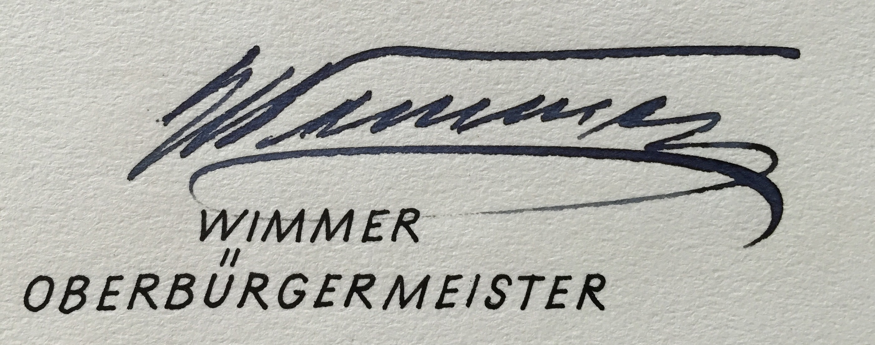 Signatur des Münchner Oberbürgermeisters Thomas Wimmer vom 3. Mai 1953 aus Anlass der Verleihung des Ehrenpreises der Landeshauptstadt Münchens zum St. Georg-Lauf